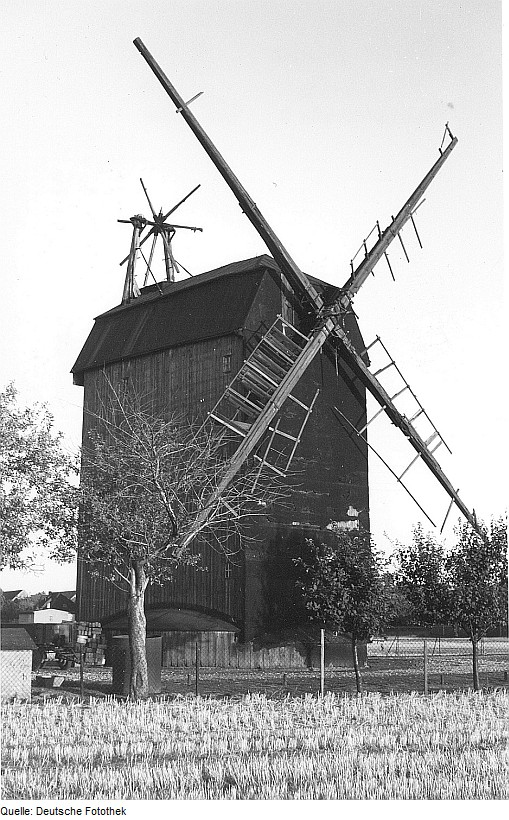 Original image description from the Deutsche Fotothek Naunhof-Fuchshain. Paltrockmühle (1927 umgebaute Bockmühle)